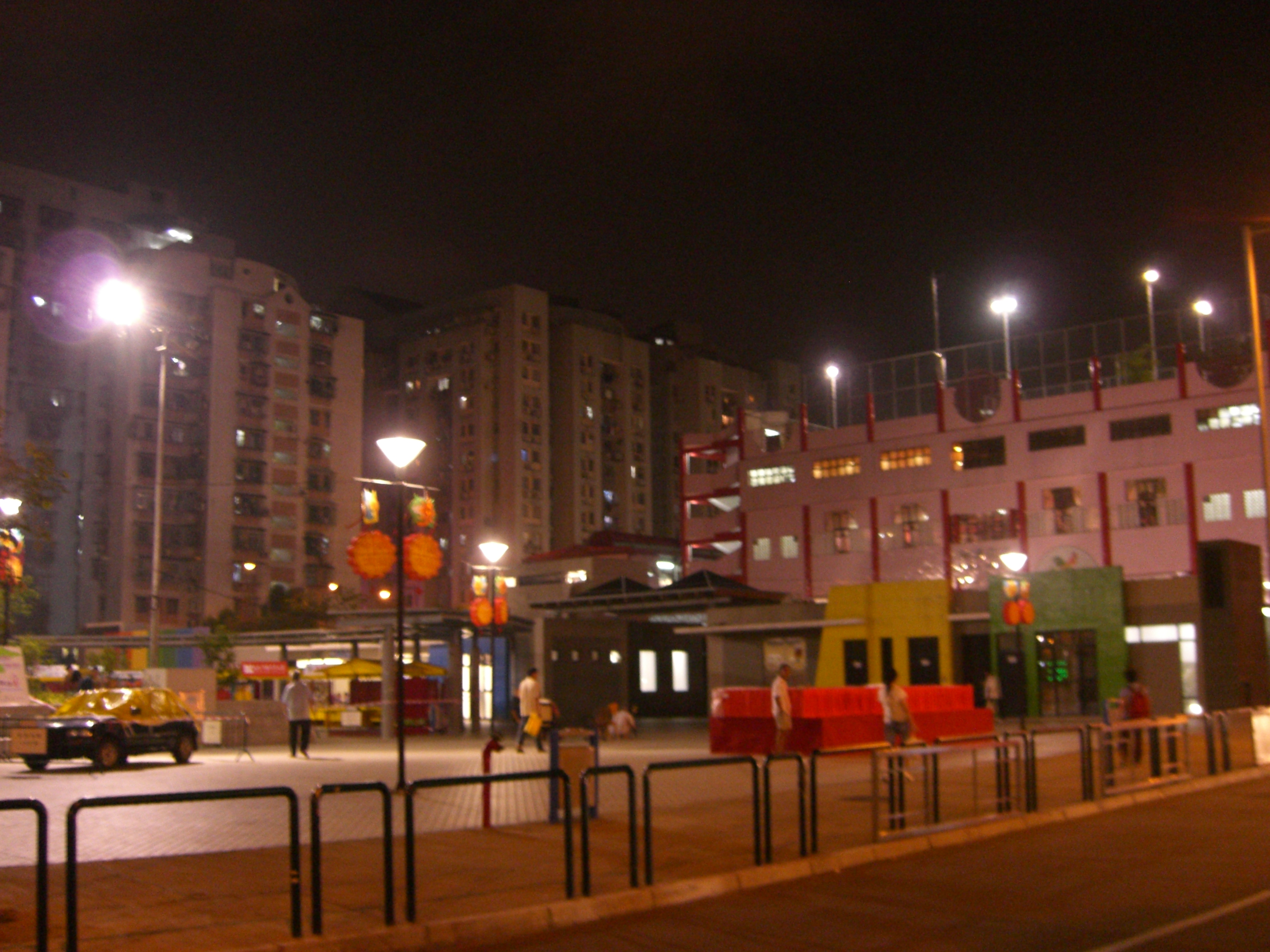 Macau Lao Hon Park